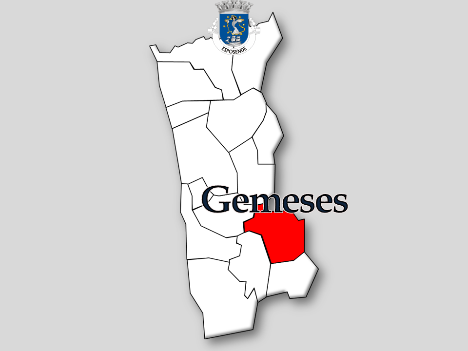 Censo 1864/2011